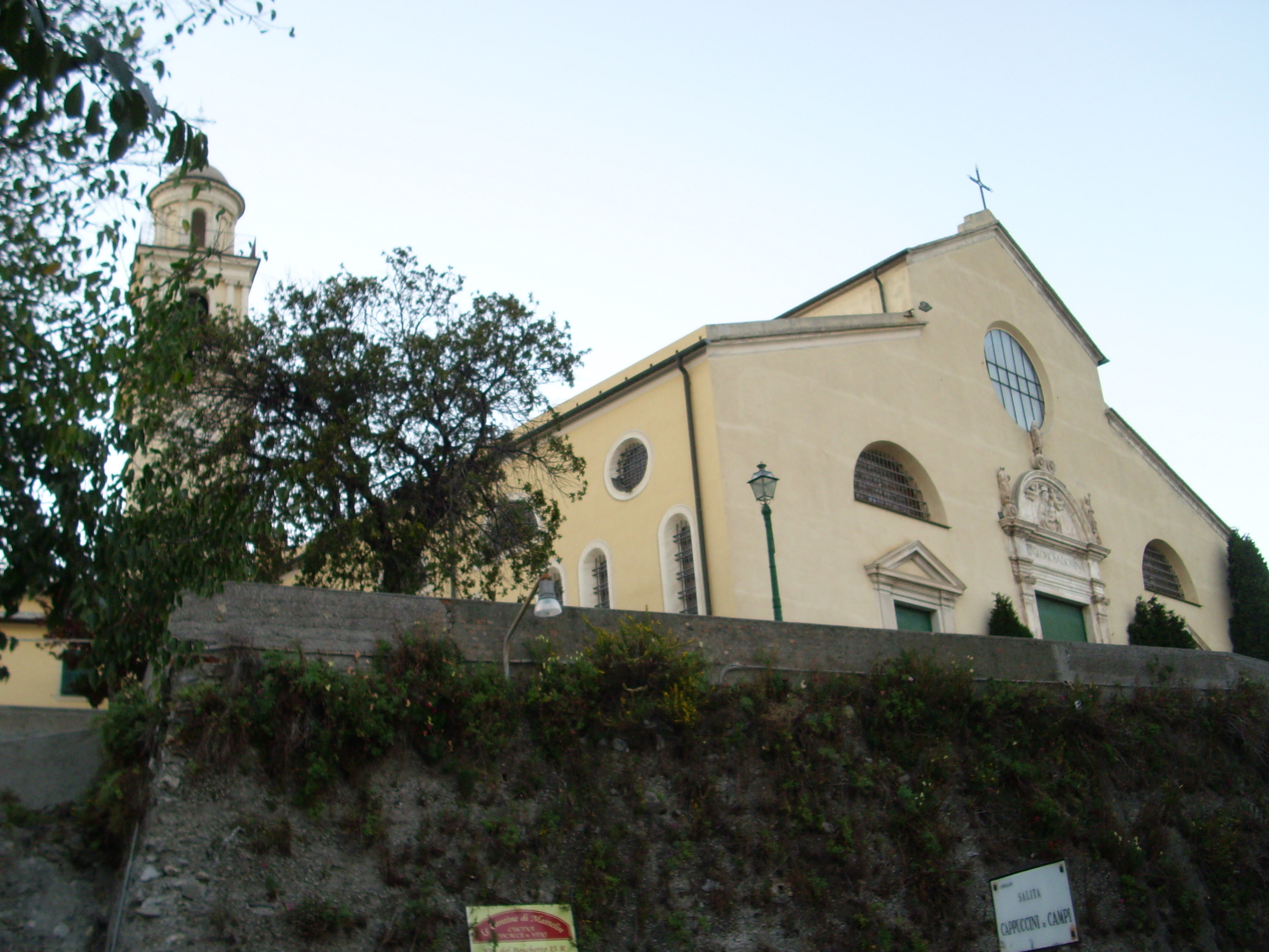 Chiesa di S. Maria e S. Michele Arcangelo, costruita nella seconda metà del XV secolo. Venne modificata in stile barocco nel 1720, per poi essere riportata successivamente ad uno stile più vicino al rimanico. Il campanile risale al 1847. Venne danneggiata dai bombardamenti Alleati, ma rimasero intatti parte della facciata e il campanile. La chiesa restaurata venne consacrata nel 1955.